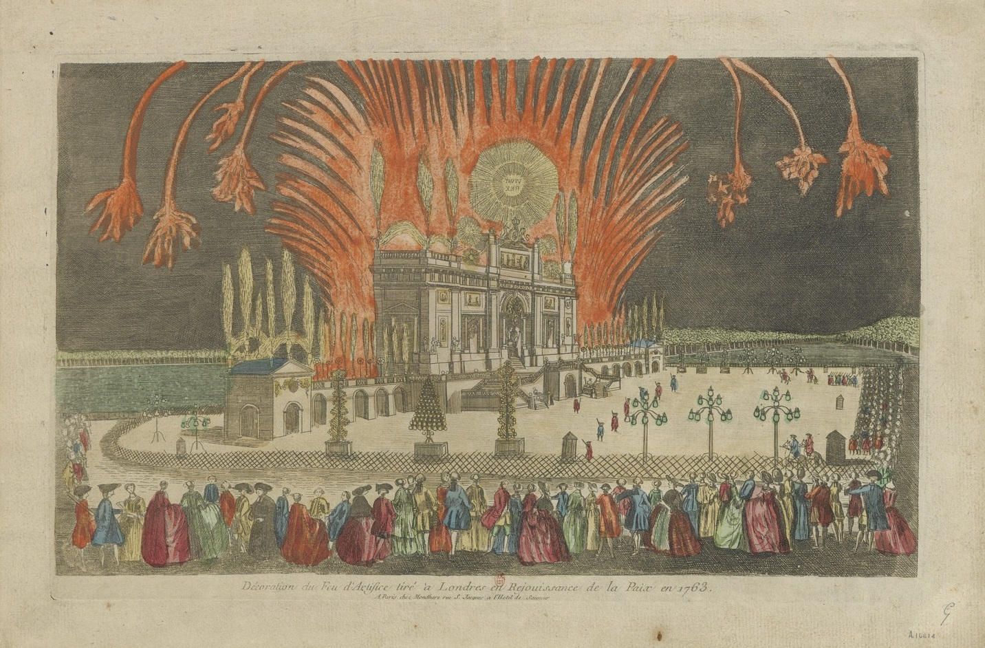 Décoration du feu d'Artifice tiré à Londres en réjouissance de la Paix en 1763. Éditeur: A Paris chez Mondhare rue S. Jacques à l'Hotel de Saumur Estampe Format: 25 x 39 cm